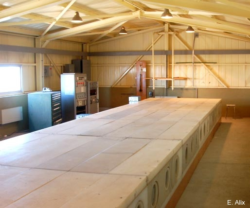 Moniteur à neutrons de Kerguelen (Terres Australes et Antarctiques Françaises)